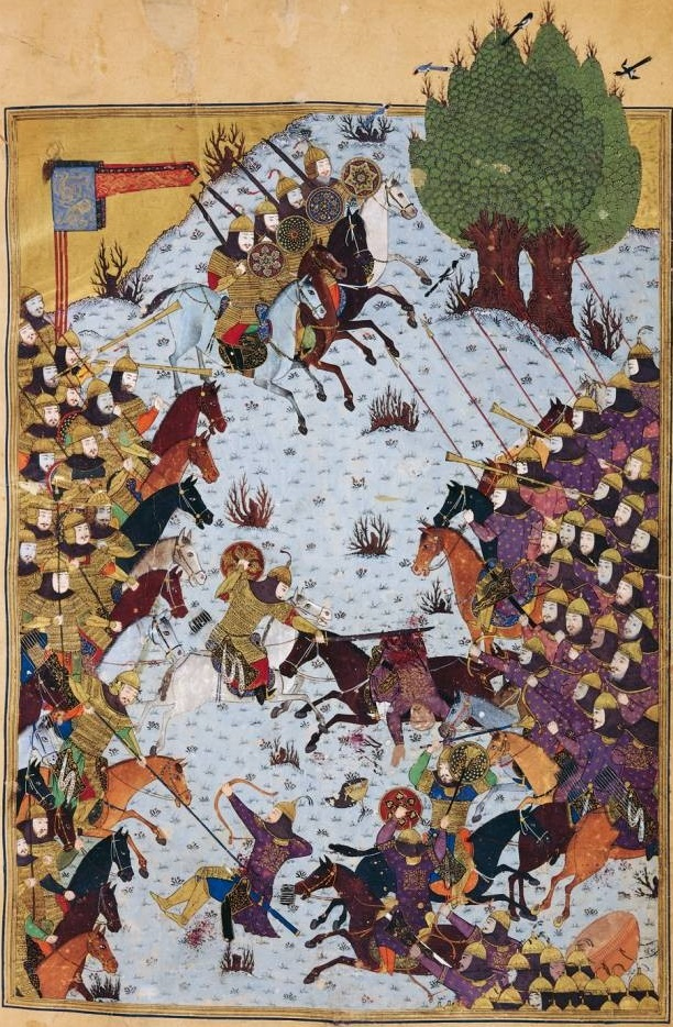 Forças de Caicosroes enfrentam forças de Afrasíabe